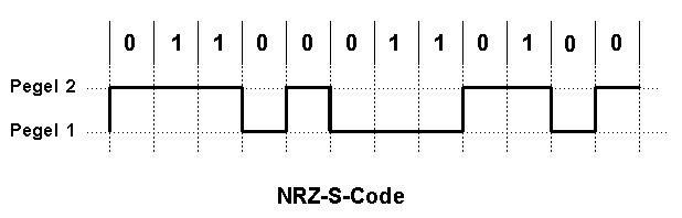 NRZ-L-Kodierung